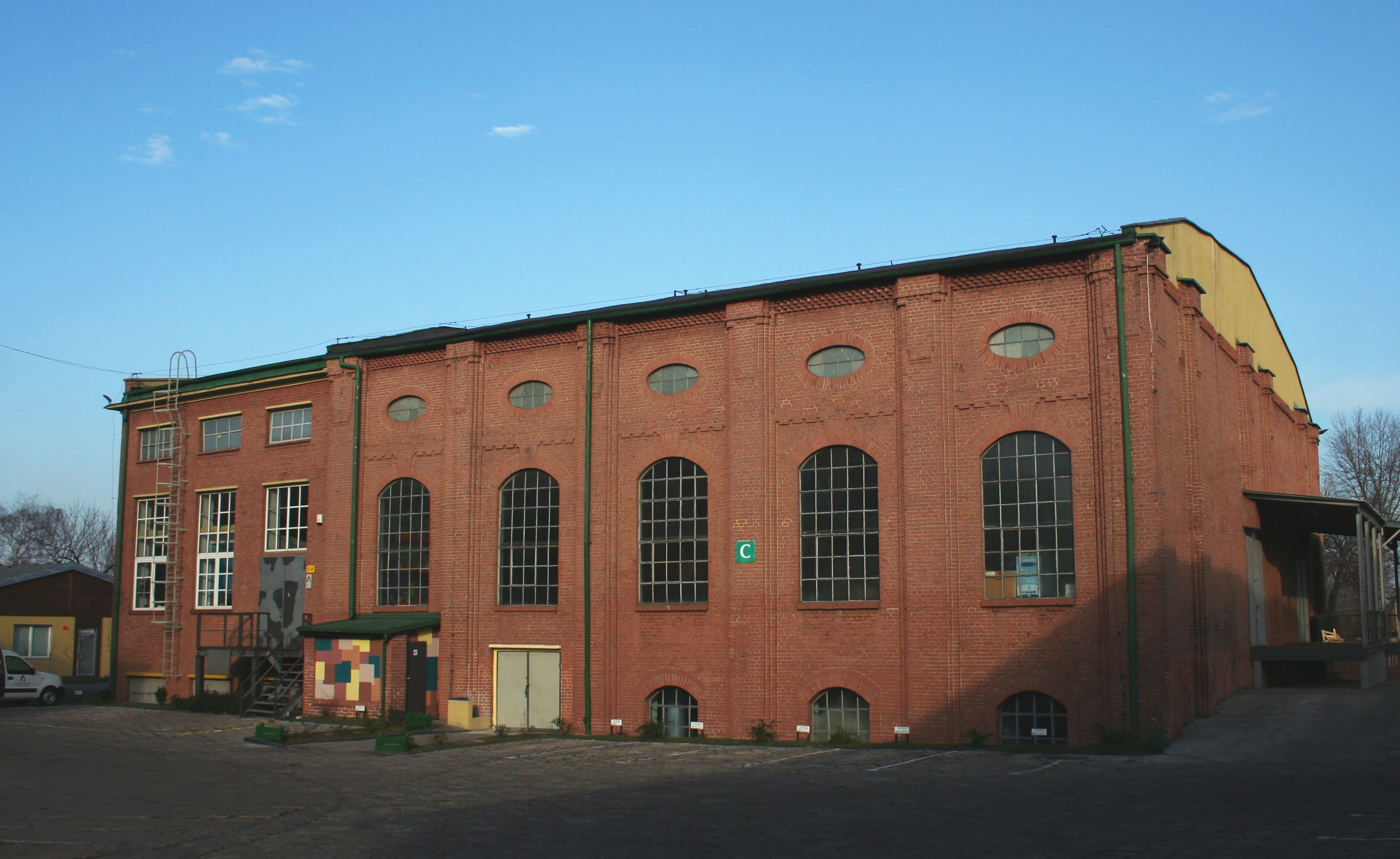 budynek przy starej Kopalni Wieczorek, w sąsiedztwie Galerii "Szyb Wilson"